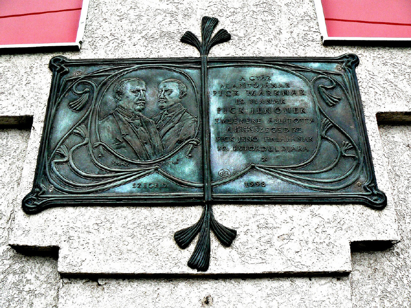 Pick Márk és fia, Jenő bronz domborműve, Felső Tisza-part, Pick Rt. Klub – az egykori gyár és lakóépület – homlokzatán